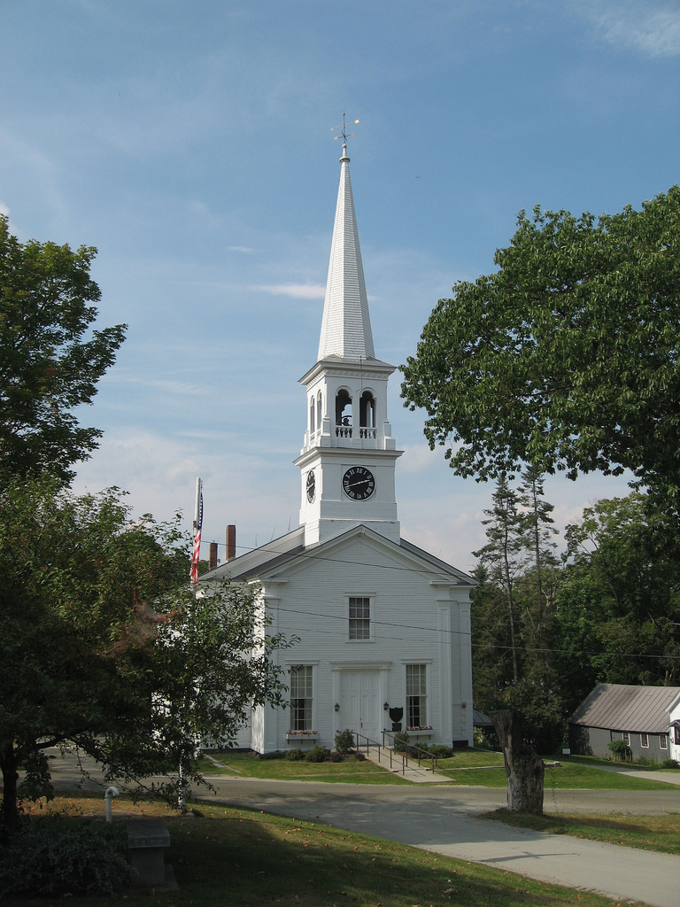 Peacham, VT